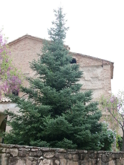 Este pinsapo está plantado hace unos 10-15 años en el jardín de la localidad de Morrano, Huesca a 640 m. de altitud